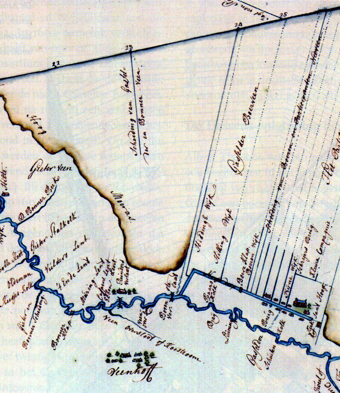 Detail van een kaart van de Hunze of Oostermoerse Vaart met de "Veenhof"